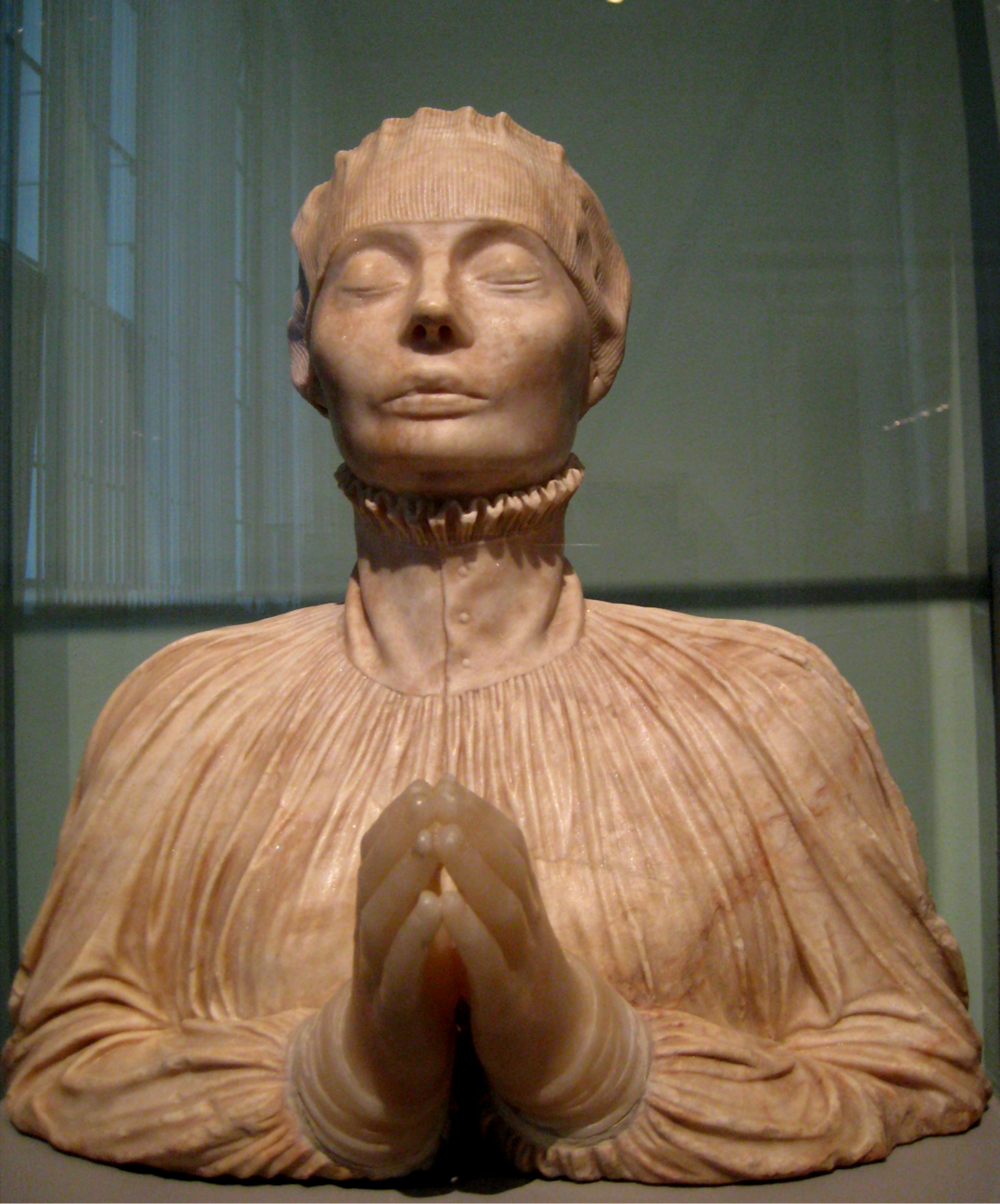 Корнелис II Флорис де Вриендт. Портрет герцогини Доротеи Прусской. Бюст с надгробия из Кенигсбергского собора. Алебастр. 1548. Кисти рук выполнены в 19 веке. Реставраторы Т. Кох (1980-е), В. Черемхин.